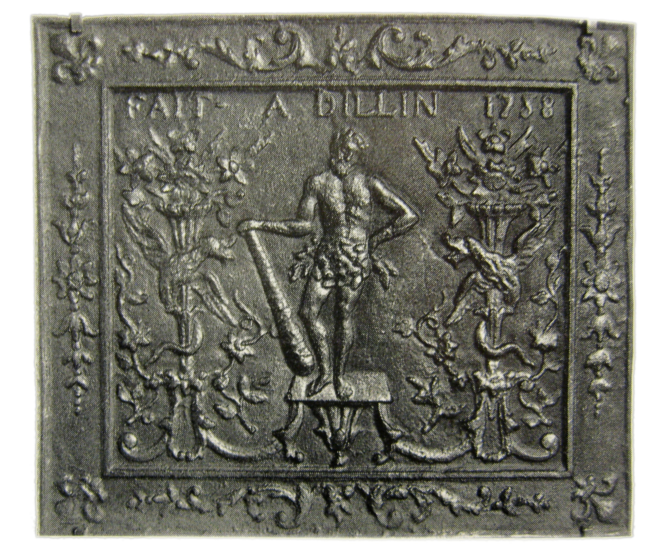 Takenplatte war ein Produkt Dillinger Hütte von 1758